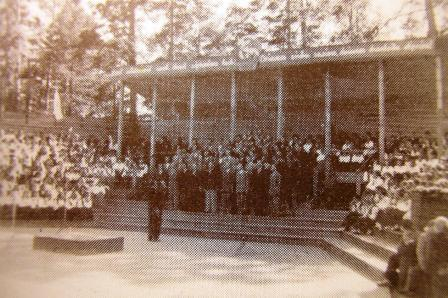 1960-ndatel Arukülla rajatud Harju rajooni laululava.